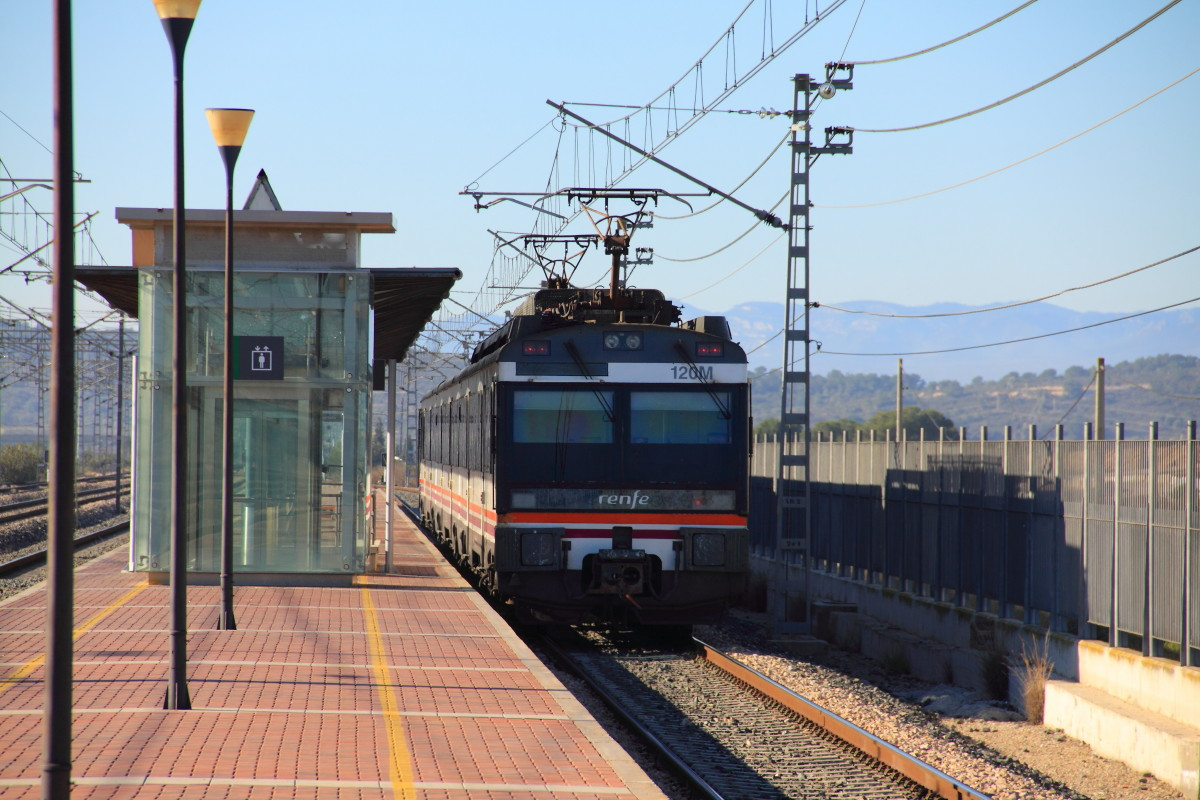 Un automotor eléctrico de la serie 470 de Renfe Operadora, que realiza el servicio Regional Exprés Barcelona Estació de França - Valencia Estació del Nord, llegando a la estación de L'Aldea - Amposta - Tortosa (Baix Ebre, Tarragona, Catalunya), a donde ha retrocedido desde Tortosa para invertir la marcha y continuar hacia Ulldecona y Valencia.